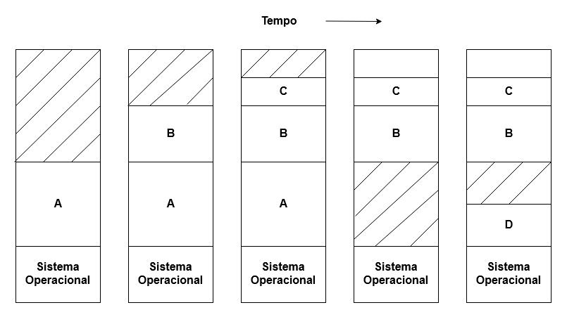 Exemplo mostra processos entrando e saindo da memória principal.